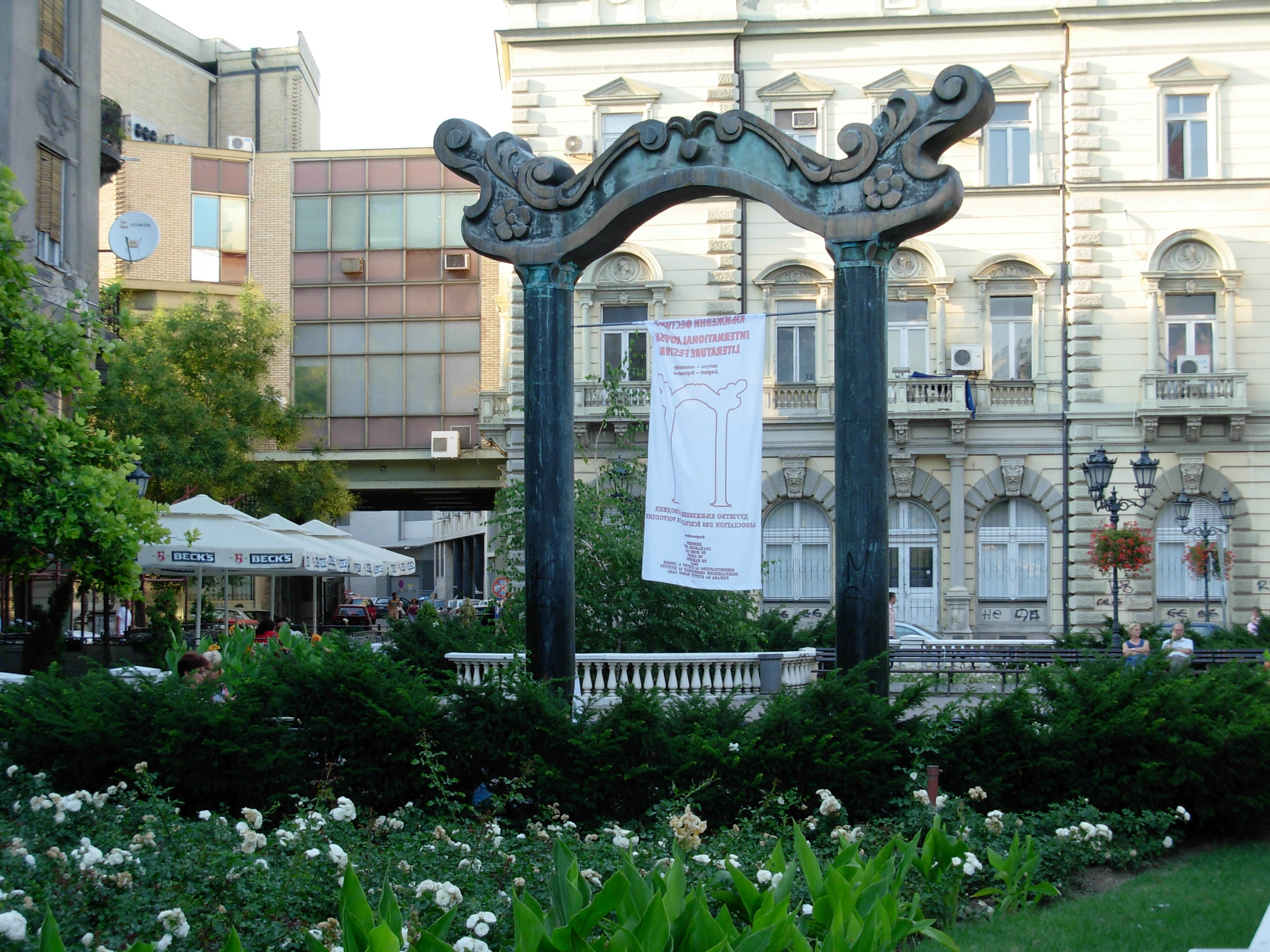 Trg mladenaca u Novom Sadu.